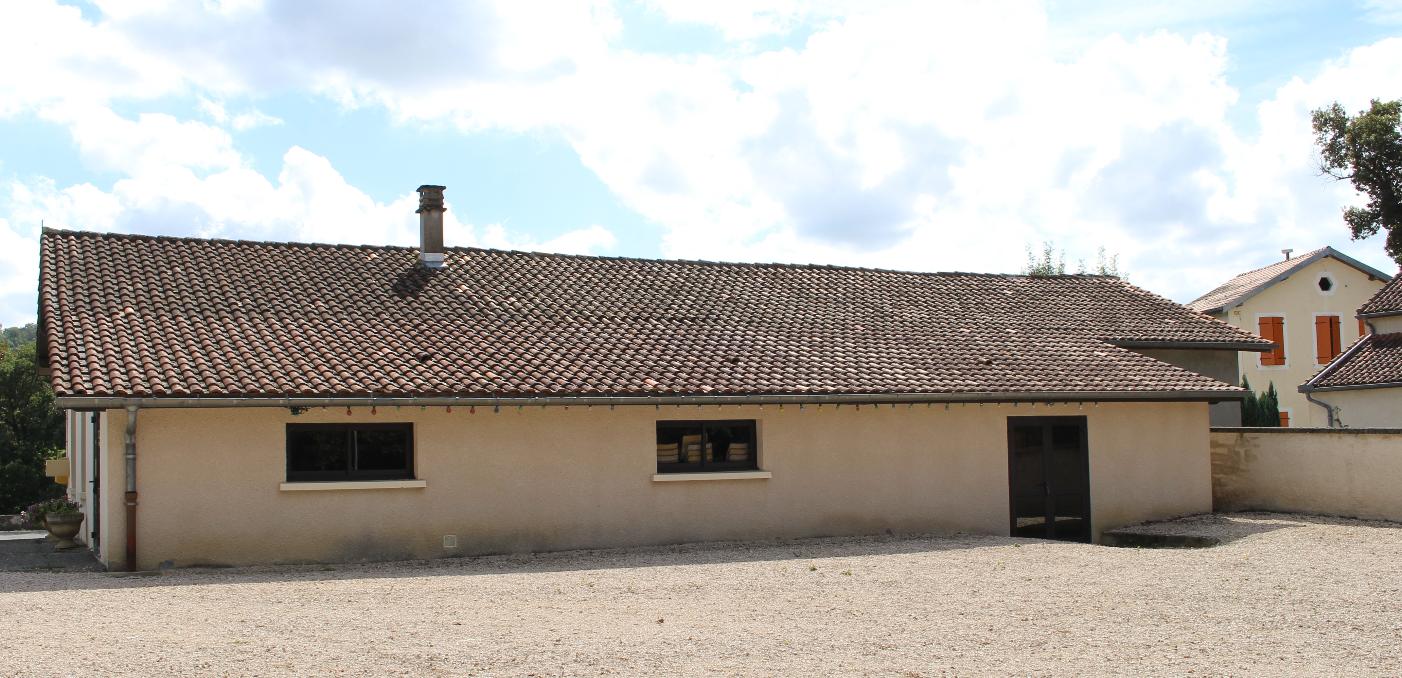 Salle des fêtes de Villemur (Hautes-Pyrénées)